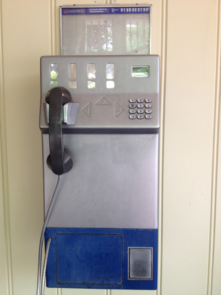 Ancien modèle en service durant les années 80-90